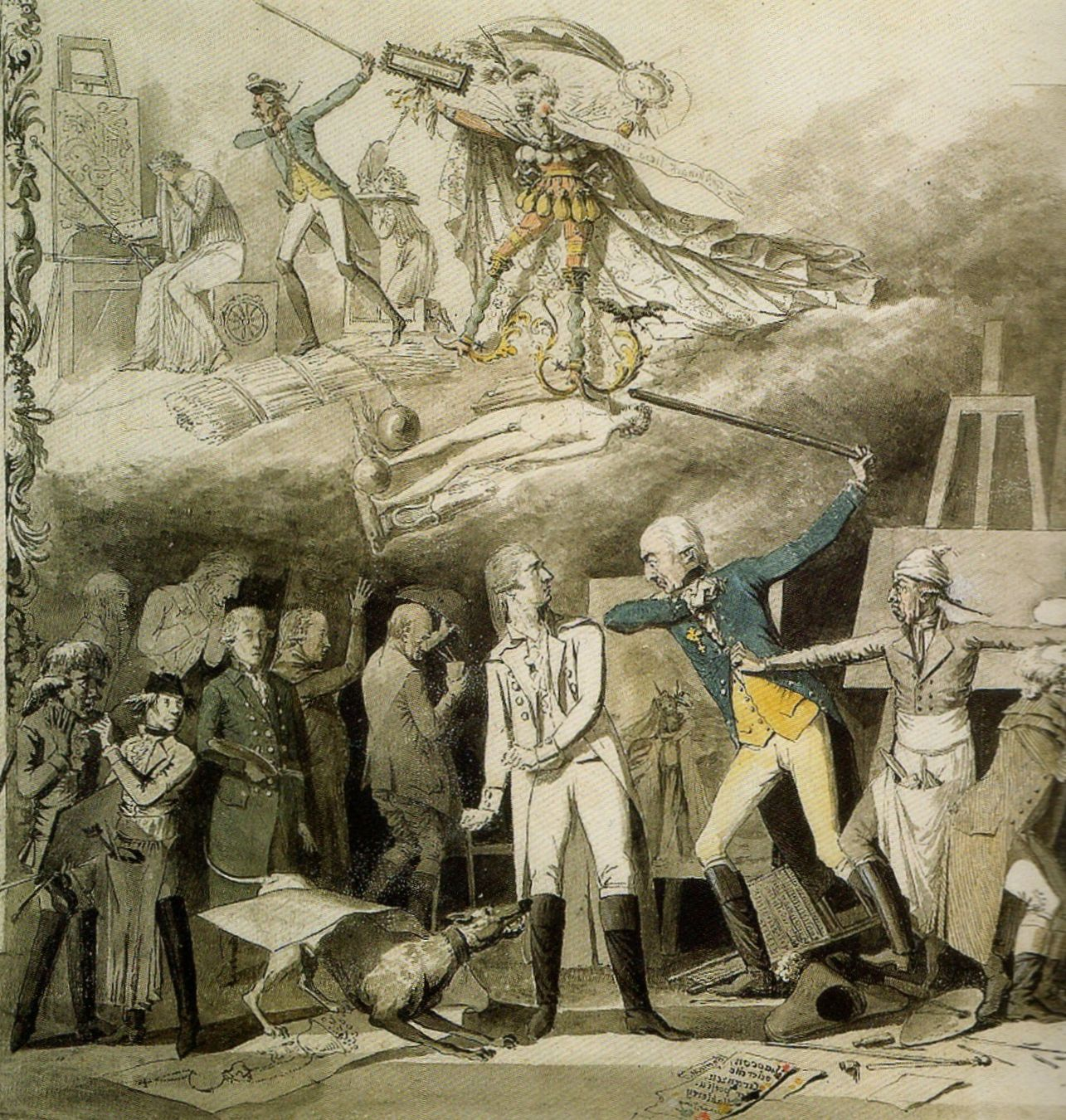 Karikatur auf die Kunstpraxis an der Hohen Karlsschule, Ausschnitt